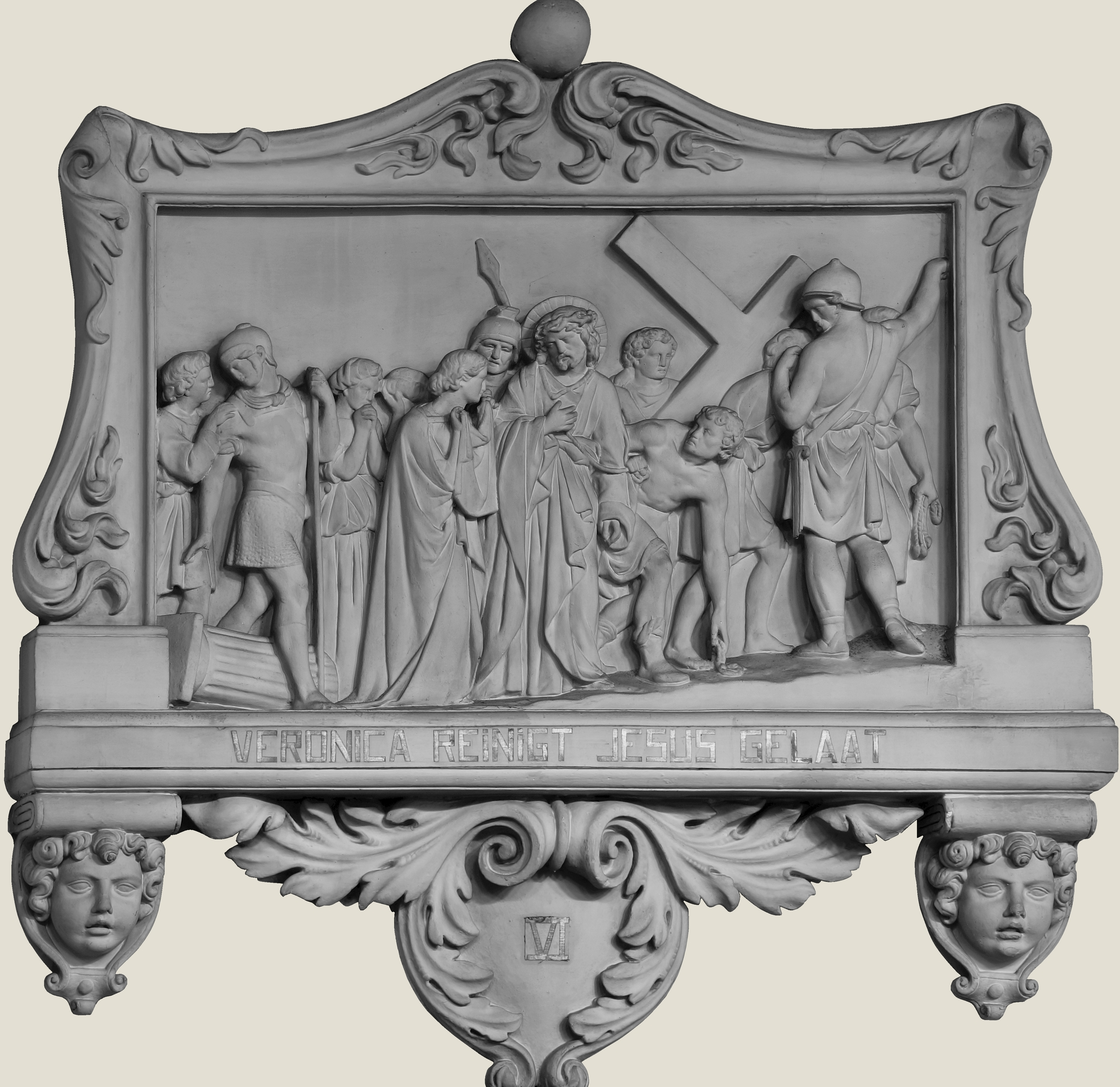 Sint-Willibrorduskerk (Berchem) - Kruisweg gemaakt door Joseph Geefs (omstreeks 1850) - 6-de statie (Bewerkt fotomateriaal)